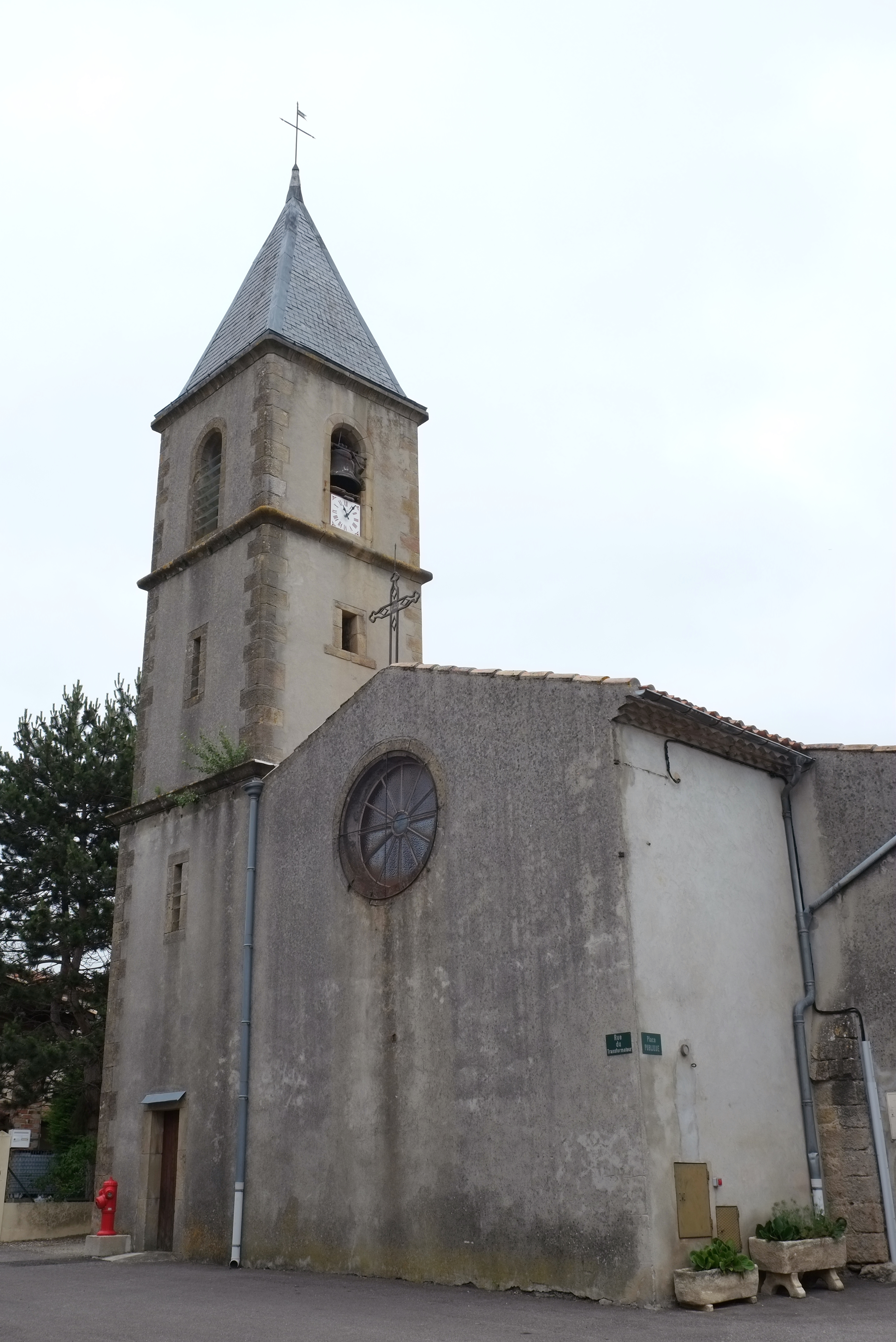 Kirche in Peyrefitte-du-Razès im Département Aude der Region Languedoc-Roussillon (Frankreich)